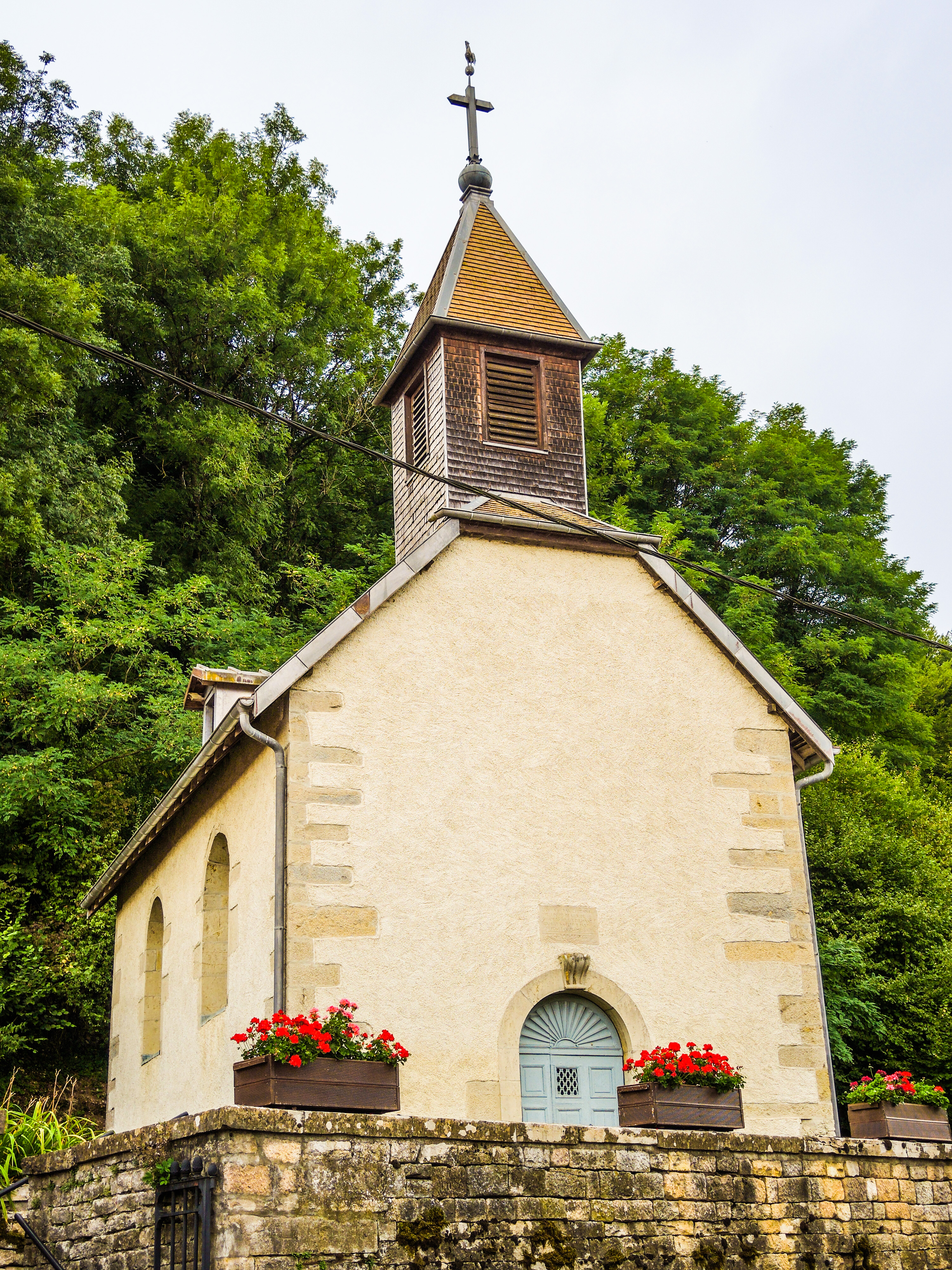 Chapelle Saint-Guérin à Chaudefontaine. Doubs.